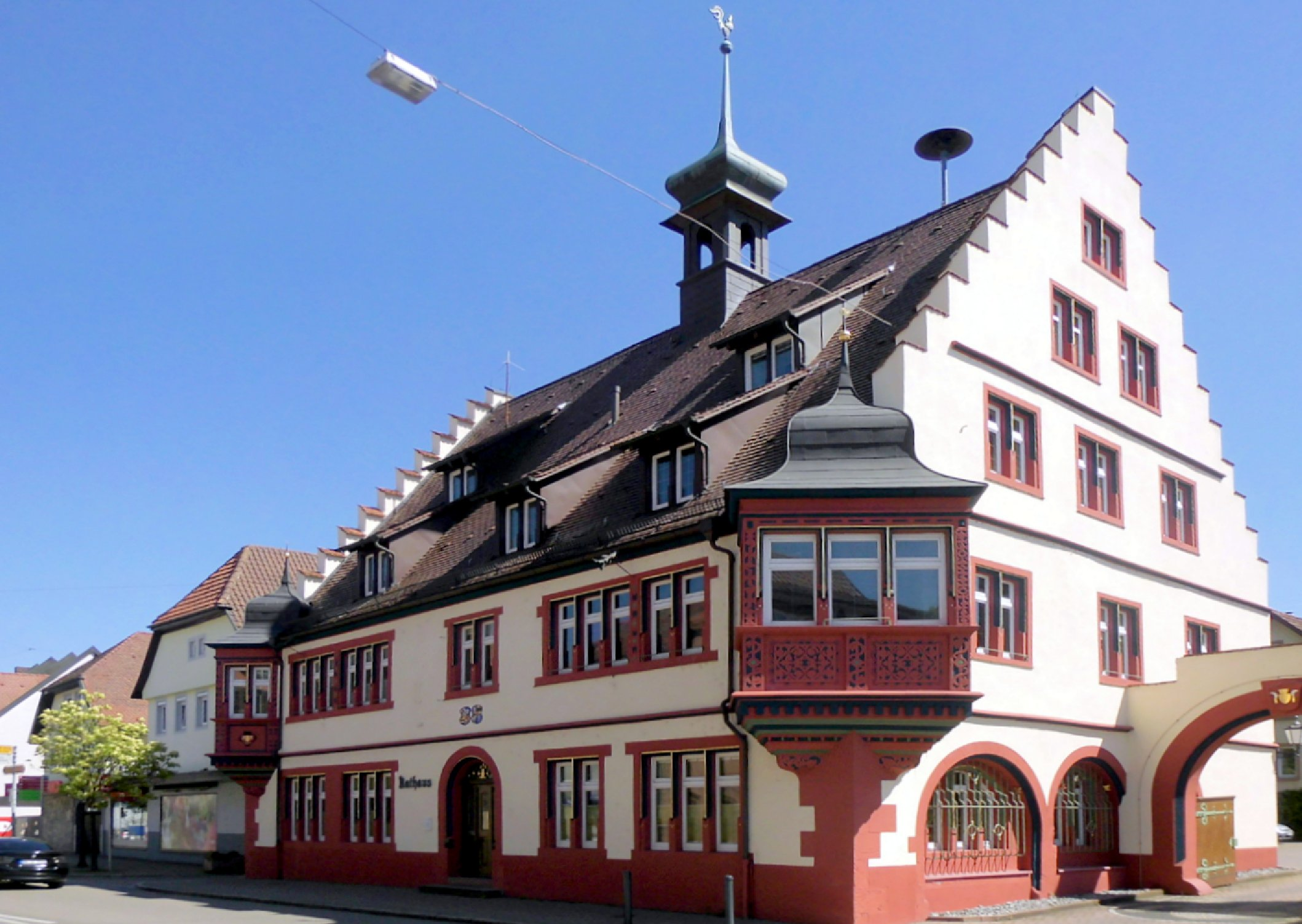 Rathaus der Gemeinde Kippenheim, Ortenaukreis, Baden-Württemberg